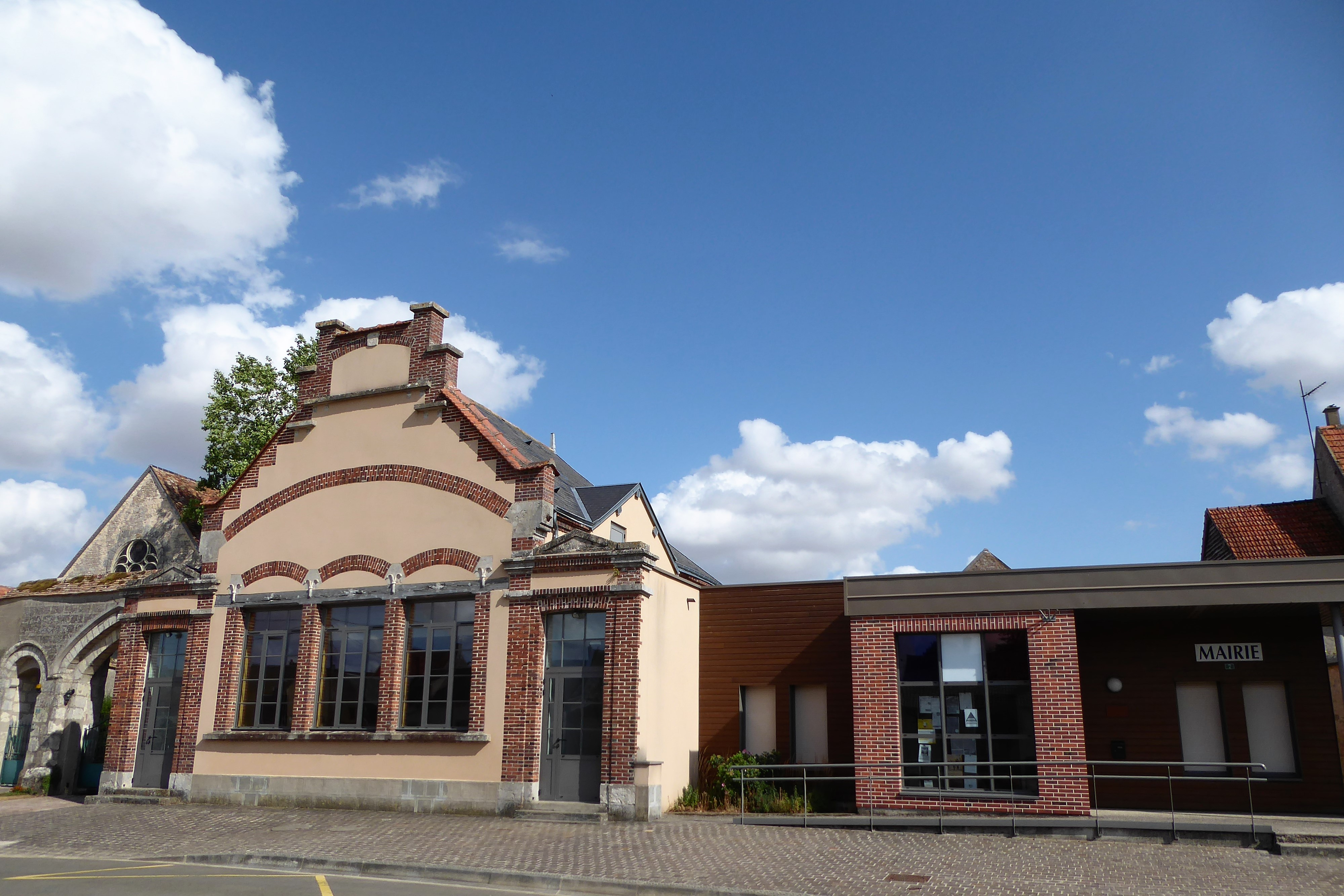 mairie de Mérouville, Eure-et-Loir, France.